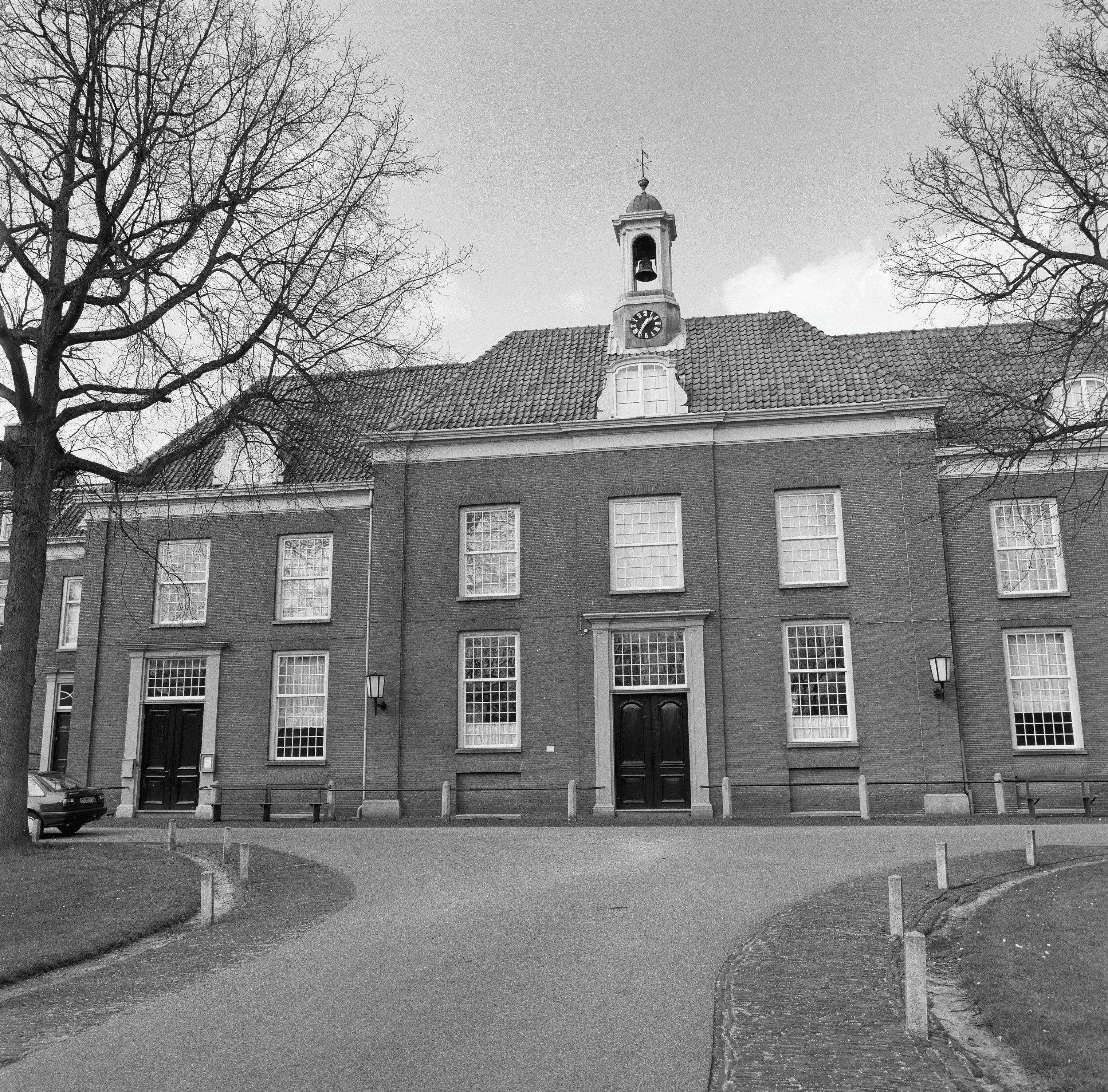 Kerk Van De Evangelische Broedergemeente: Exterieur VOORGEVEL, TOREN